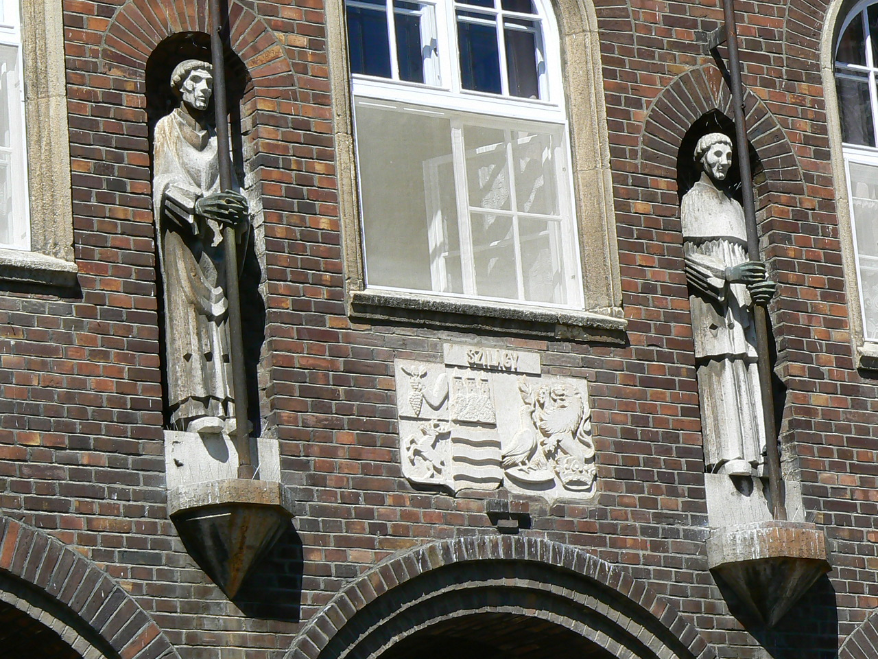 Ohmann Béla: Zászlótartó barátok; elhelyezték 1930-ban. Mészkő szobrok, a kezek anyaga bronz, másfélszeres életnagyságúak.